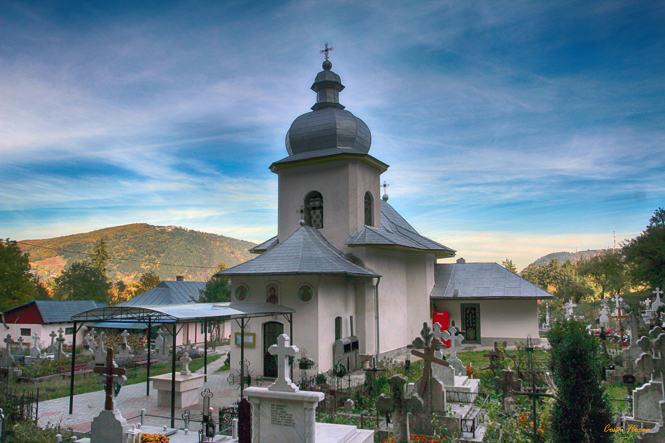 Biserica "Sf. Apostoli"